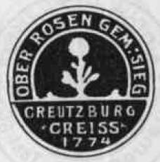 Altes Siegel der Gemeinde Ober Rosen im Kreis Kreuzburg OS.